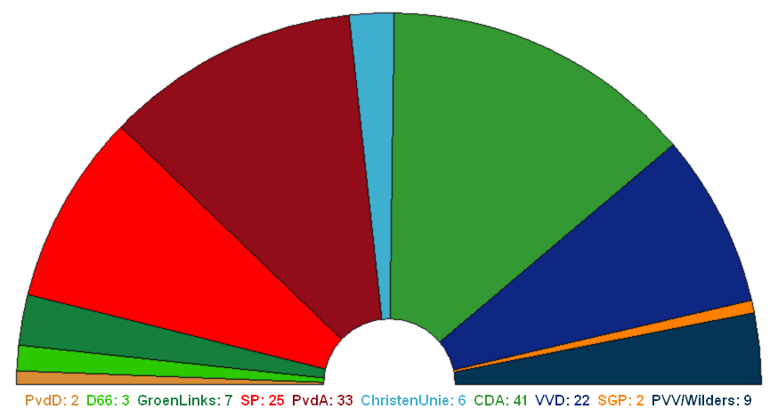 Verbeterde versie van vorig exemplaar. Één zetel van de SP naar de PvdA.